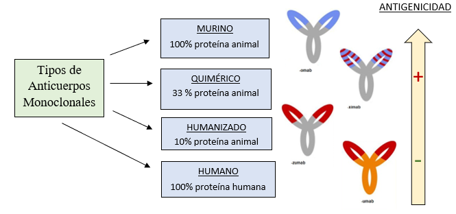 Distintos tipos de MoAbs junto a sus características y antigenicidad.